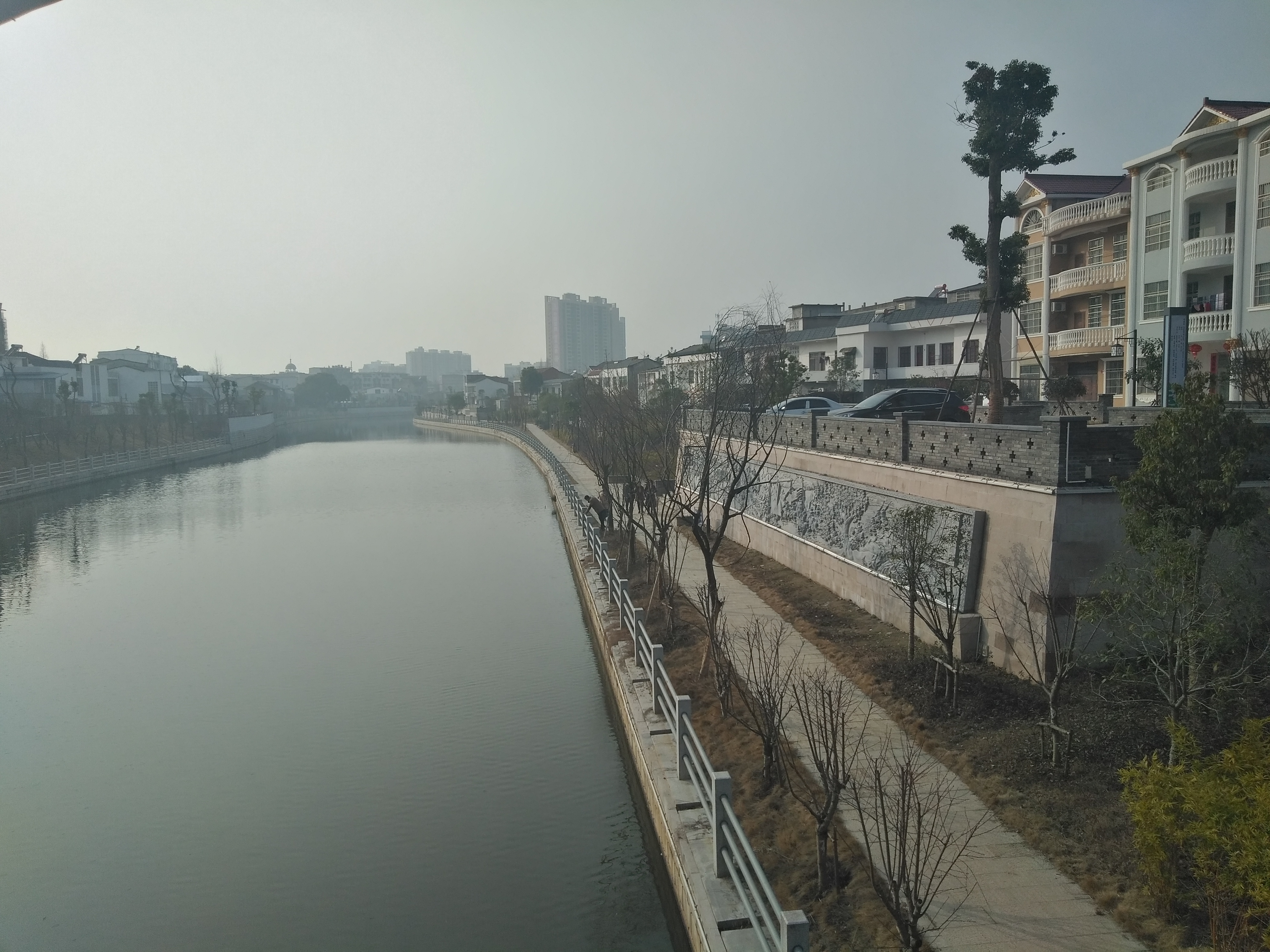 雷溪河 三路桥沿岸